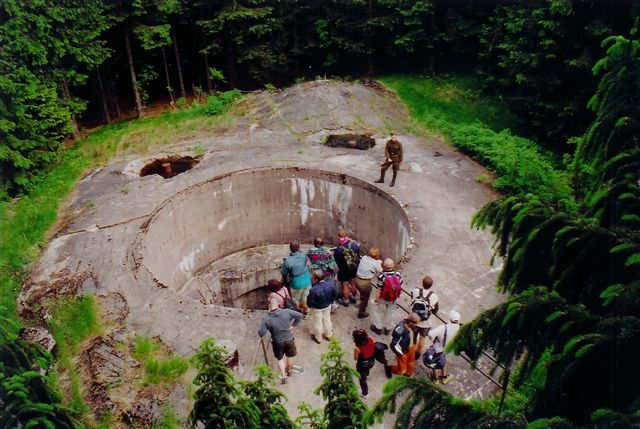 Objekt pro dělovou otočnou a výsuvnou věž K-S 22 Horymír, dělostřelecká tvrz Bouda